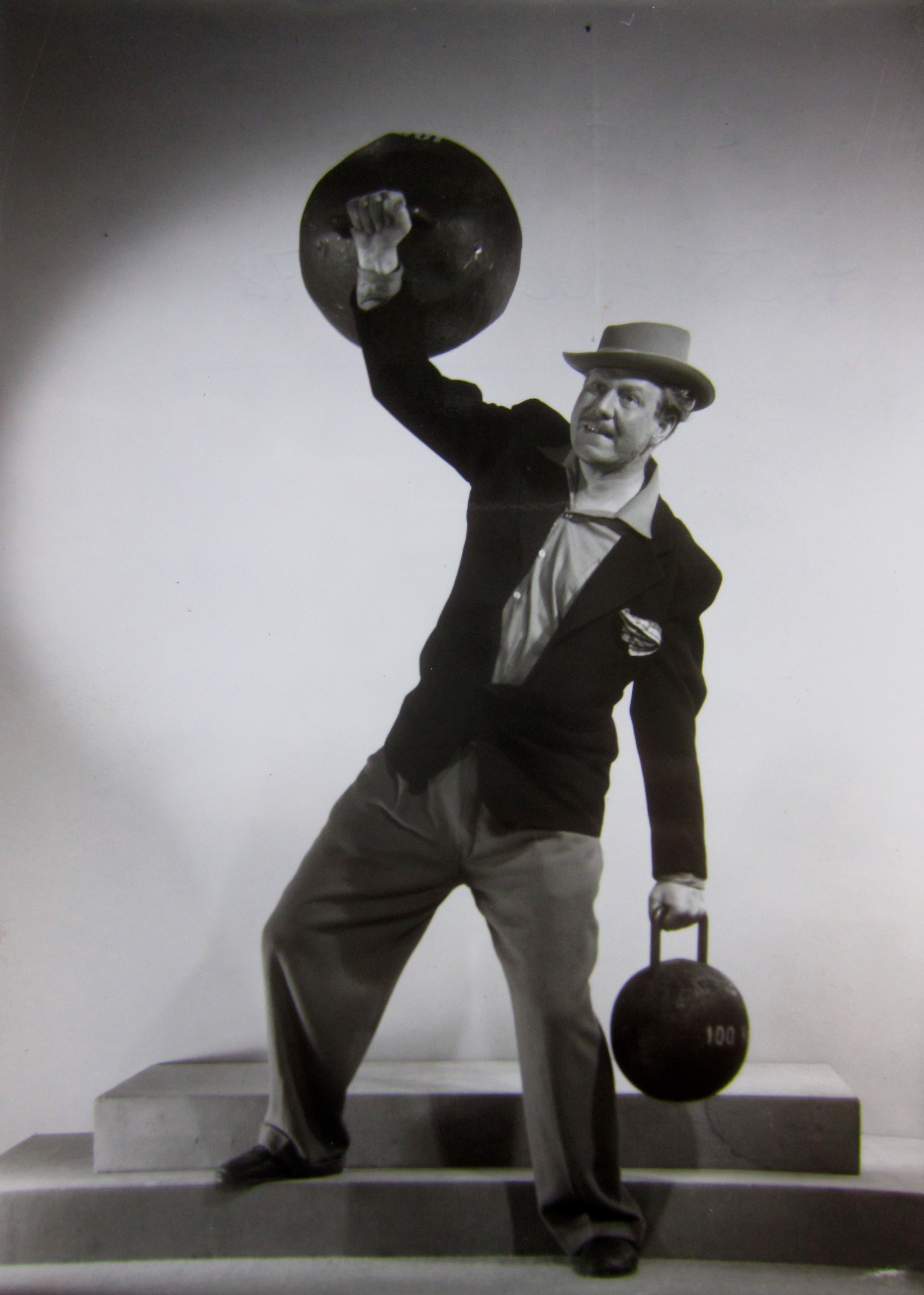 Åke Fridell, 1919-85, svensk skådespelare